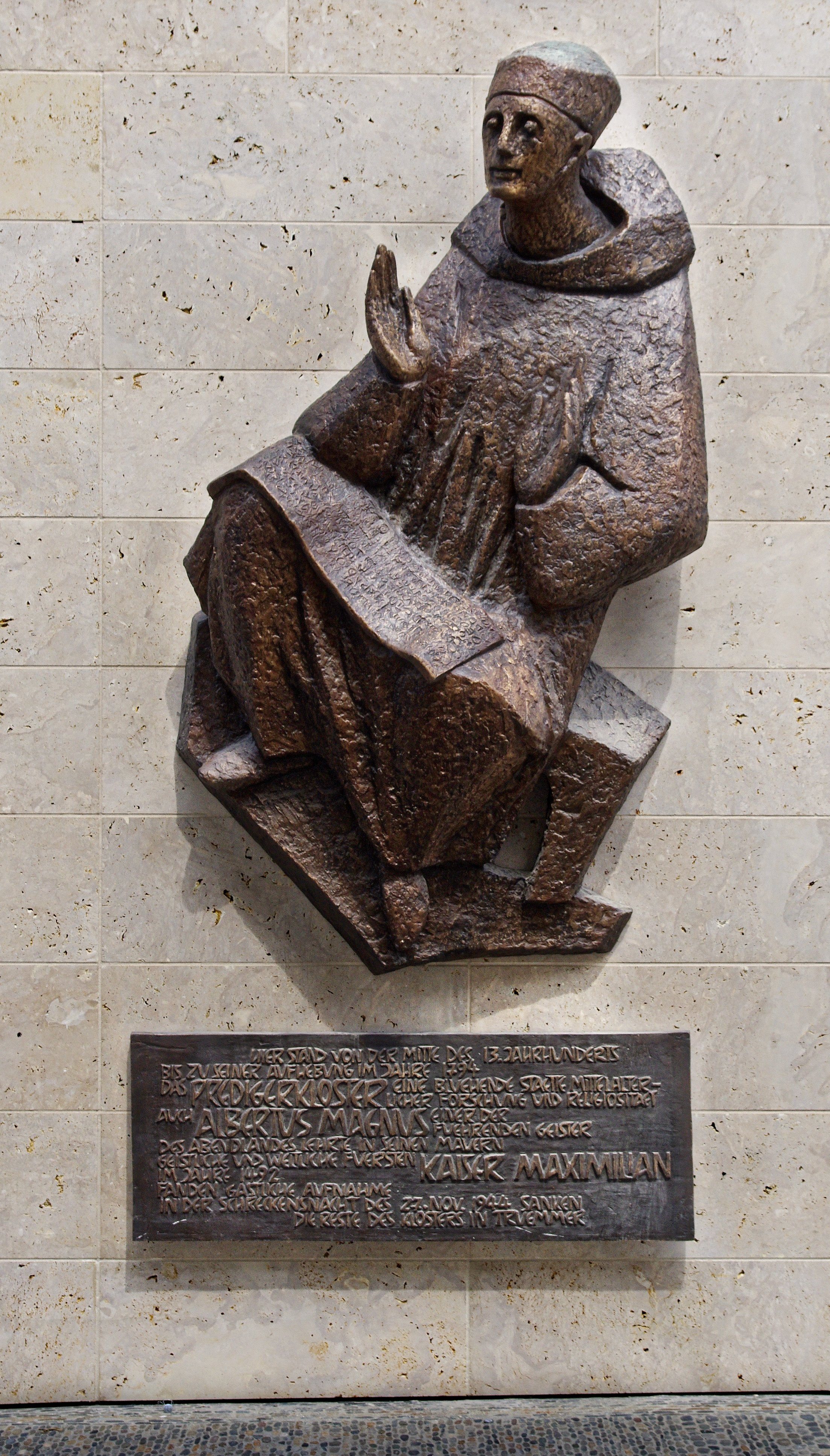 Bronzeplastik von Albertus Magnus, Unterlinden, Freiburg im Breisgau